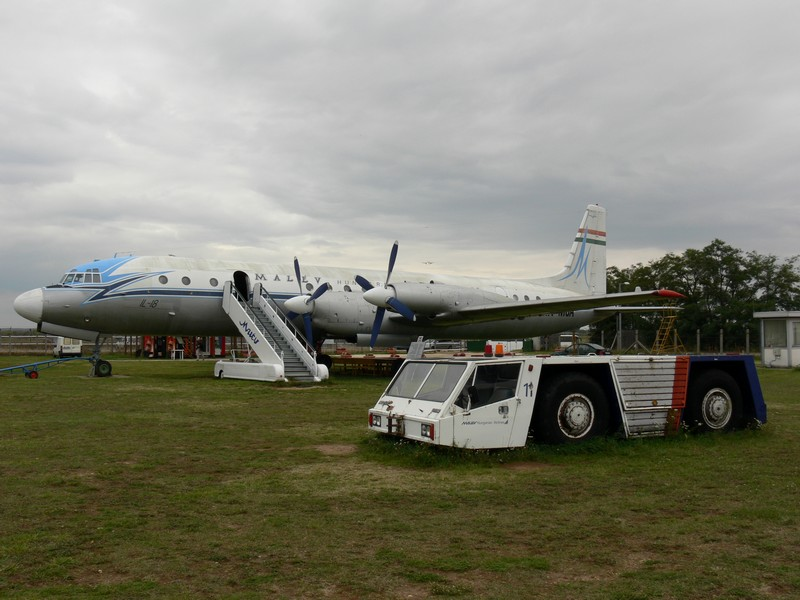 Ferihegy Repülőgép Emlékpark, Budapest